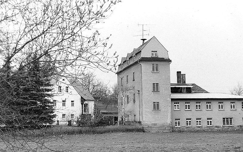 Original image description from the Deutsche Fotothek Göda-Coblenz. Fehrmann-Mühle